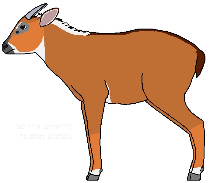 איור של סרו אדום